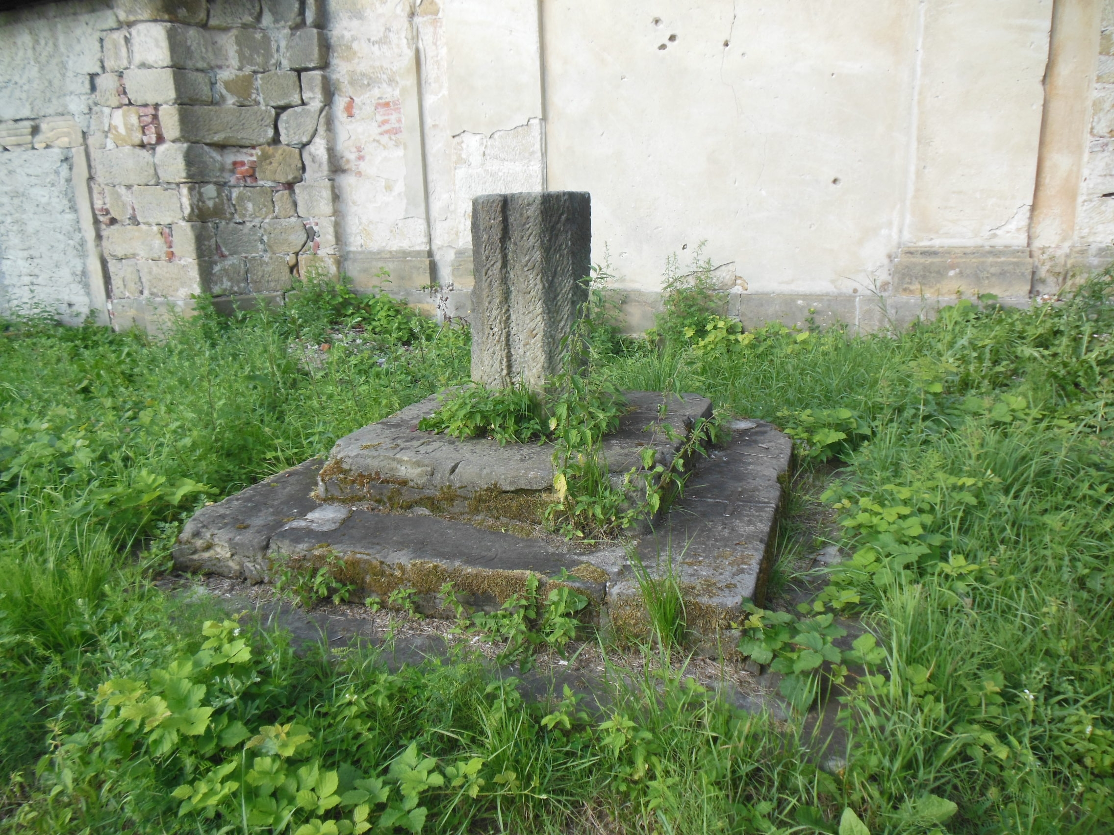 Sloup v Čechách (okres Česká Lípa). Ulice Novoborská, kaple svatého Jana Nepomuckého, zbytky sloupu (?) u kaple.